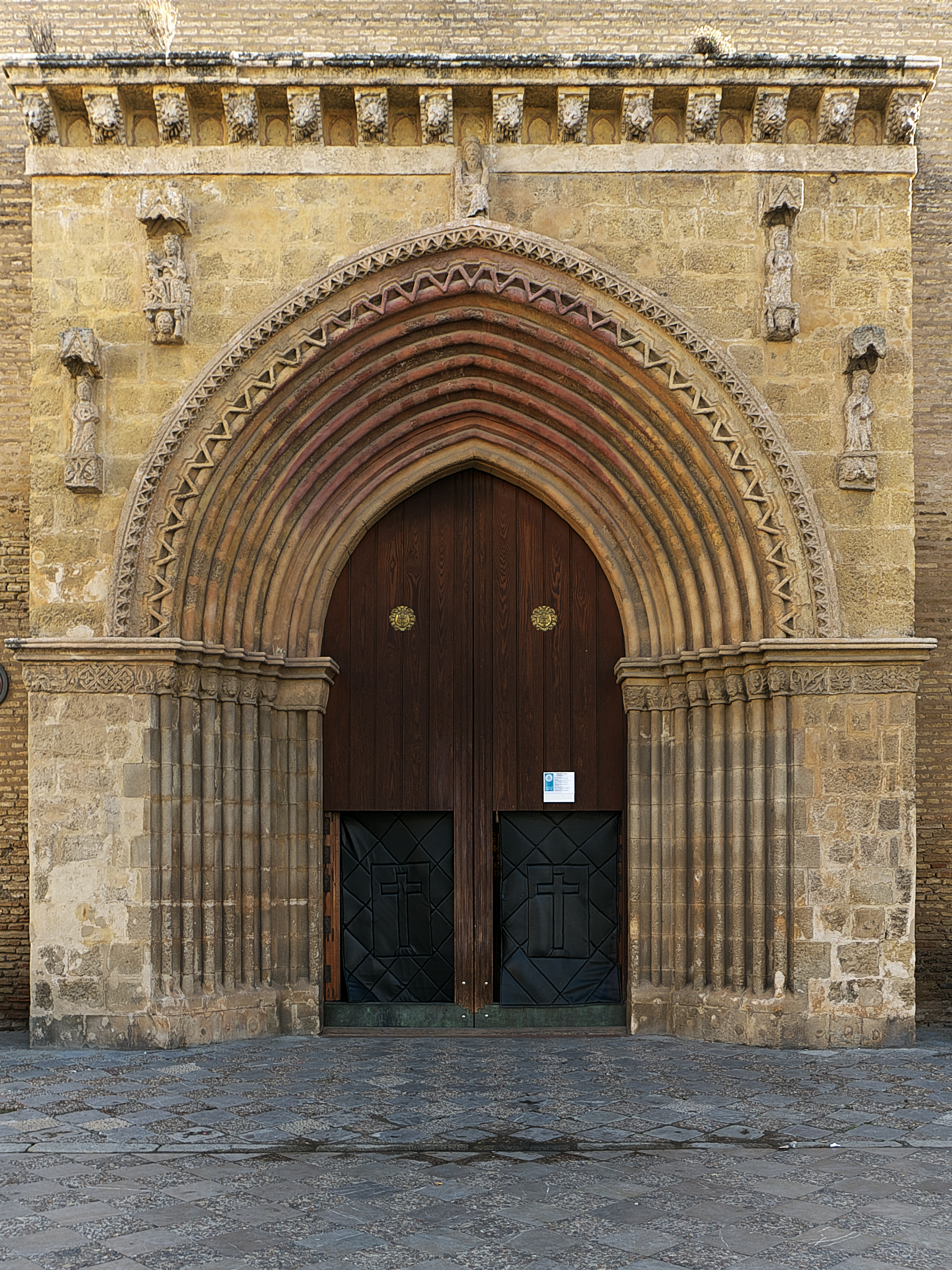 Iglesia de Santa Marina (Sevilla). Portada de los pies. Es la más interesante de las tres que presenta la iglesia.